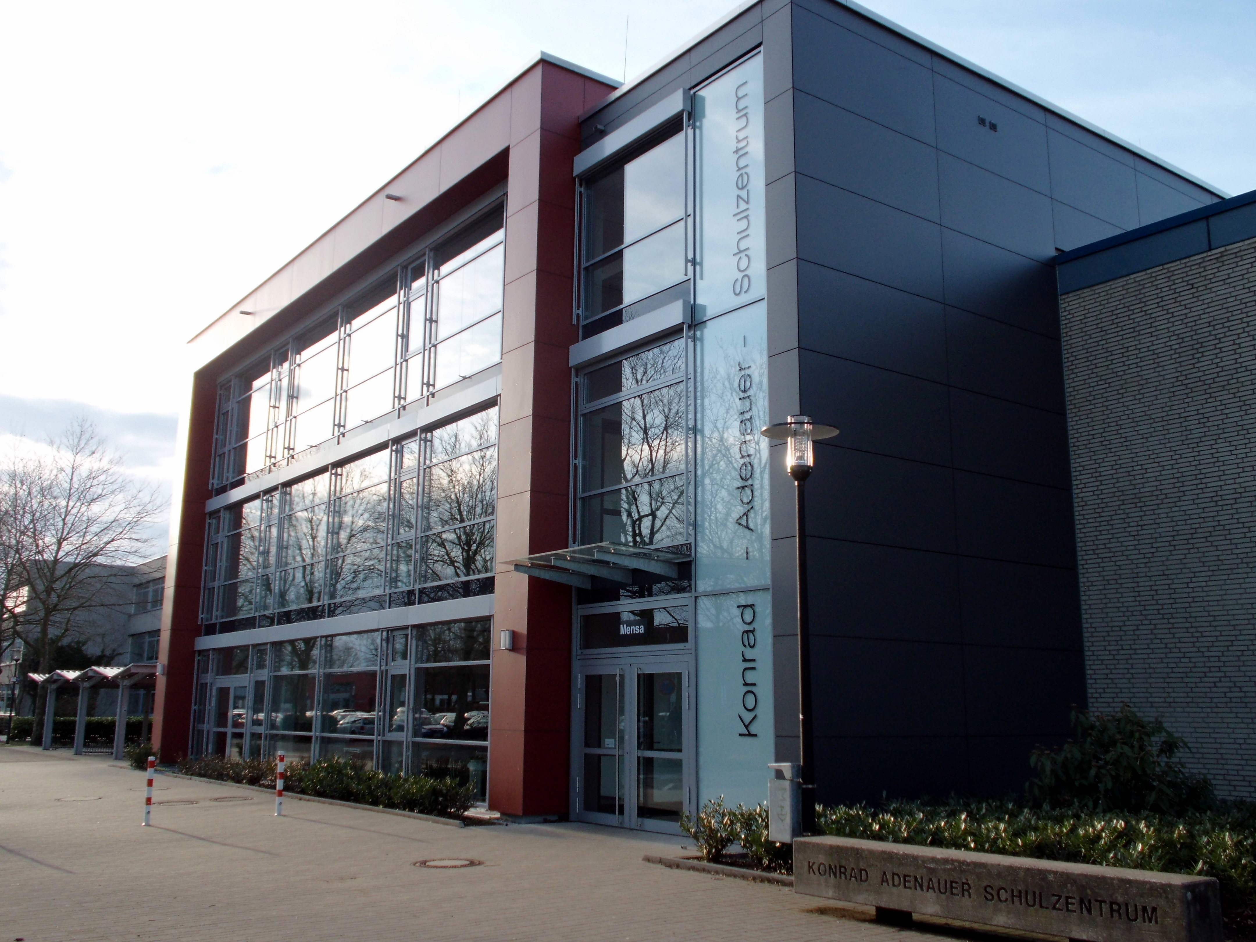 Mensa im Konrad-Adenauer-Schulzentrum in Verl, Nordrhein-Westfalen